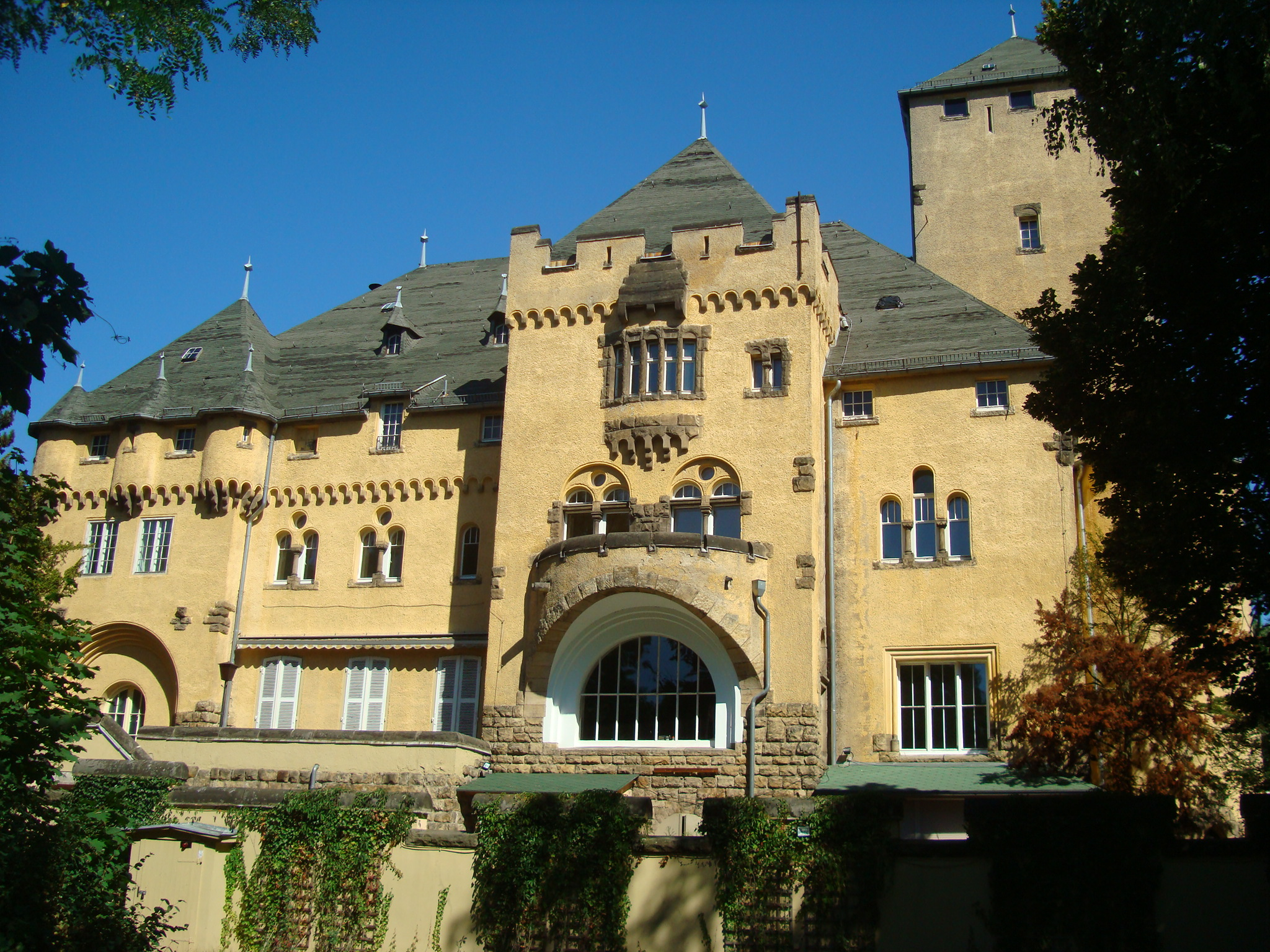 Hakeburg